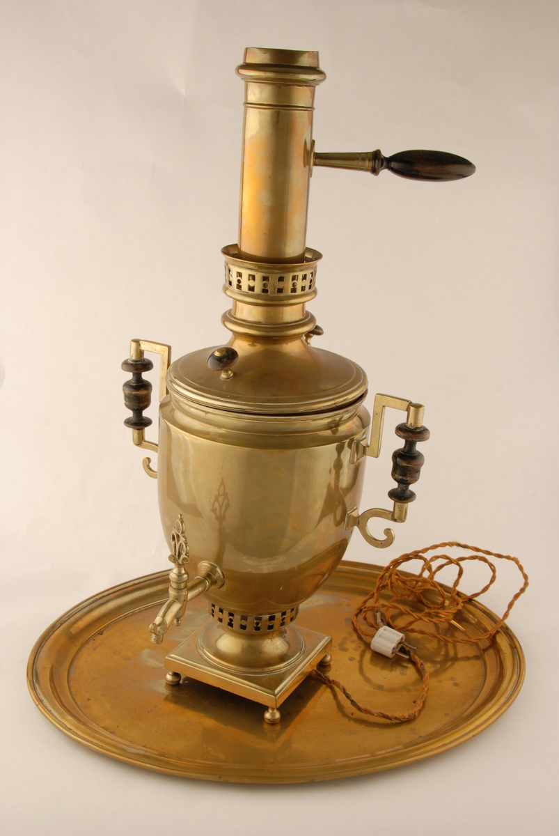 Samovar av ukjent opprinnelse